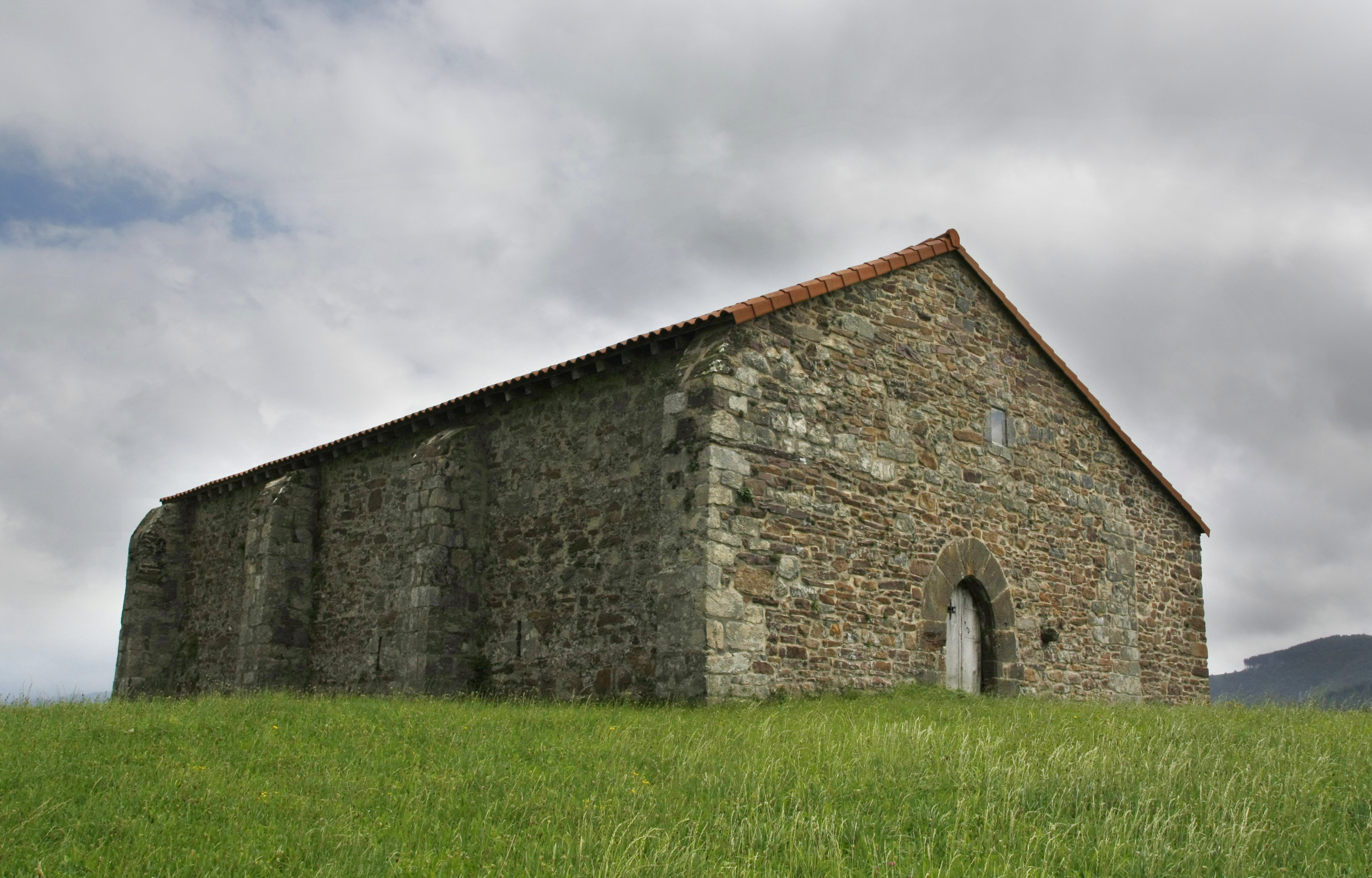 San Sebastian ermita - Berastegi